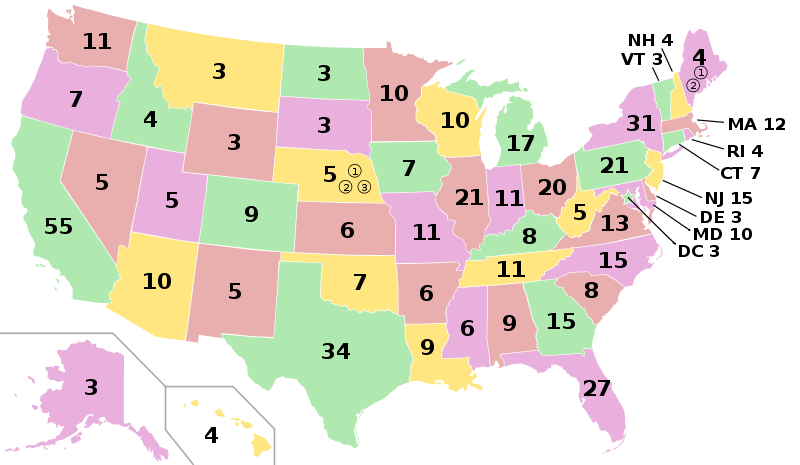 US Electoral college map